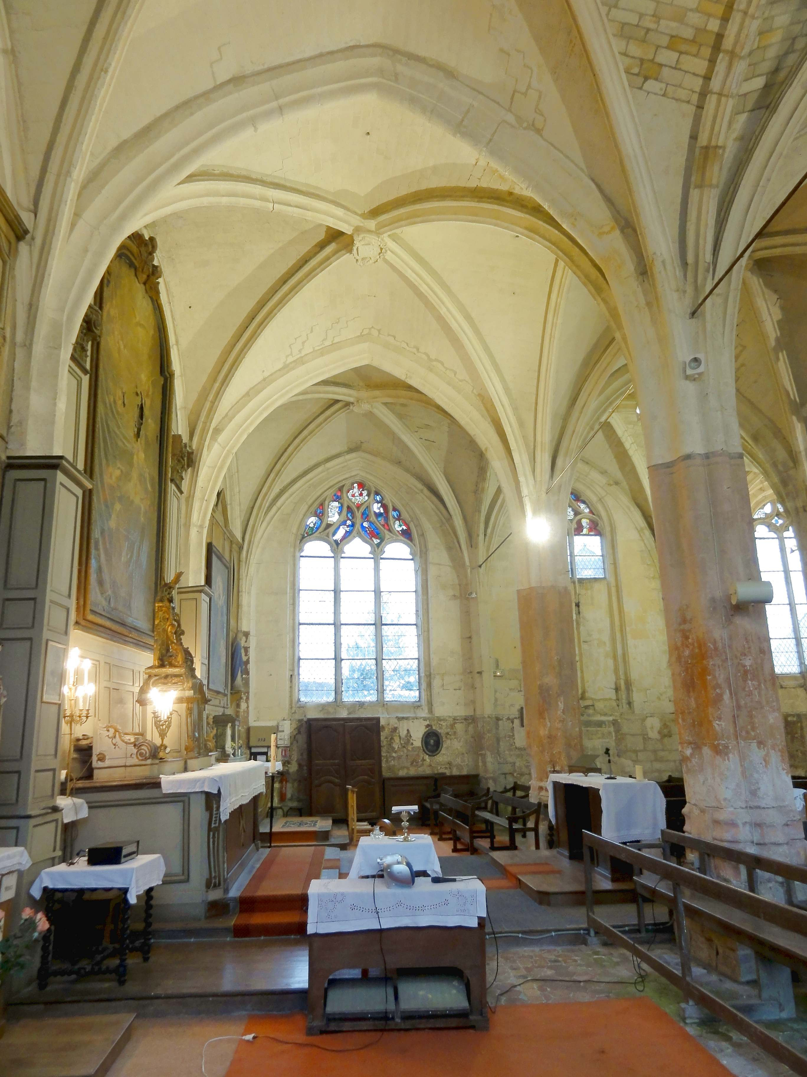 Collatéral nord, 3e travée, vue vers le sud.